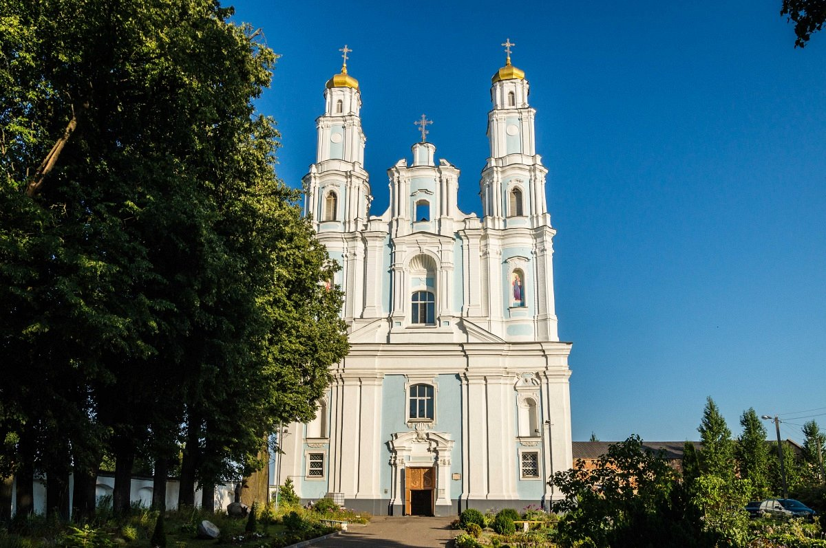 Глыбокае. Царква